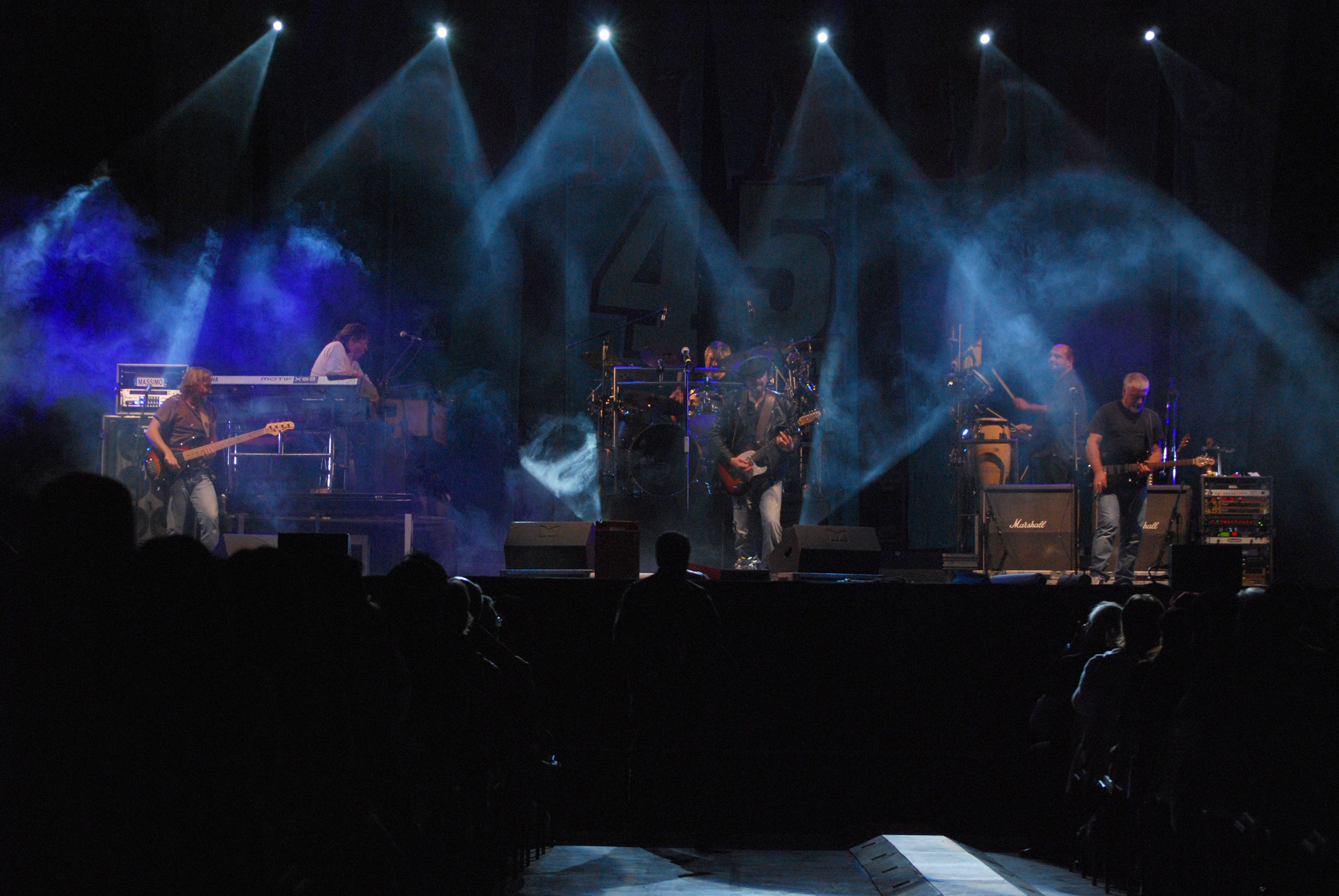 Palavela, 22 settembre 2008 45 anni insieme I Nomadi